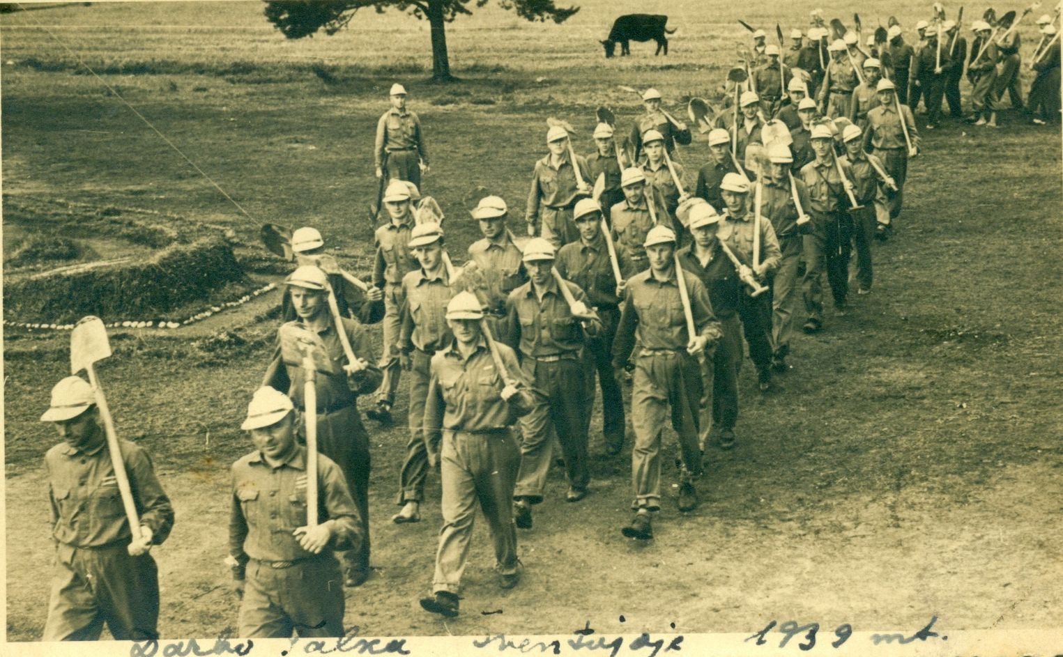 Darbo talka Šventojoje, 1939 m.